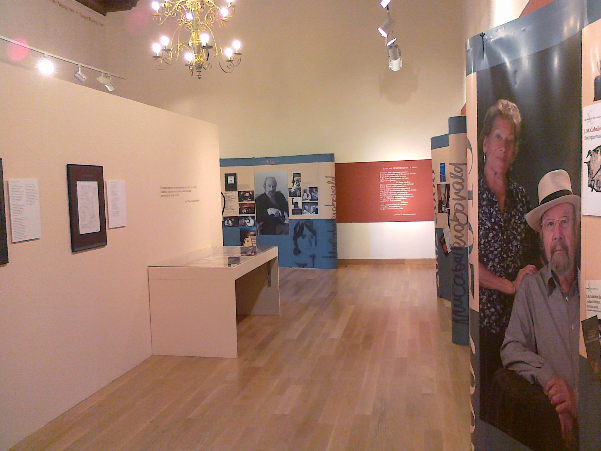 Exposición de José Manuel Caballero Bonarld con motivo de su Premio Cervantes. Rectorado de la Universidad de Alcalá de Henares (Madrid, España)